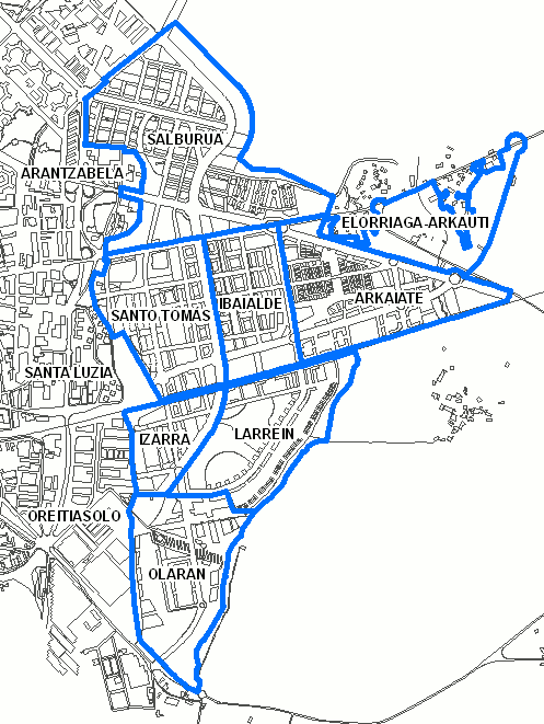 Salburuko auzo berriak / Nuevos barrios de Salburua